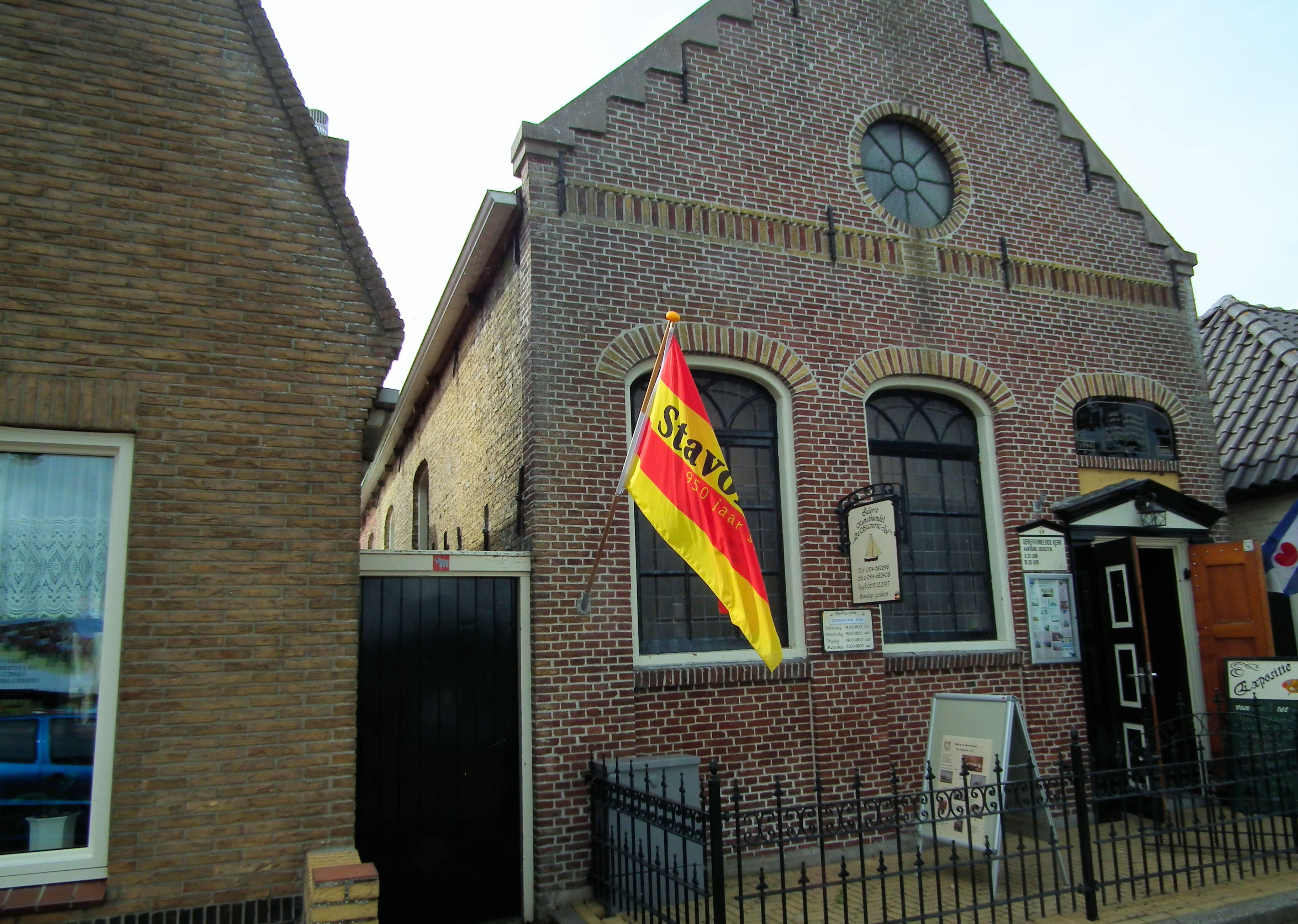 Nederland - Friesland - Stavoren - Stavoren is Hanzestad en Frieslands oudste stad. Pittoreske grachtjes. Een aantal fraaie panden.